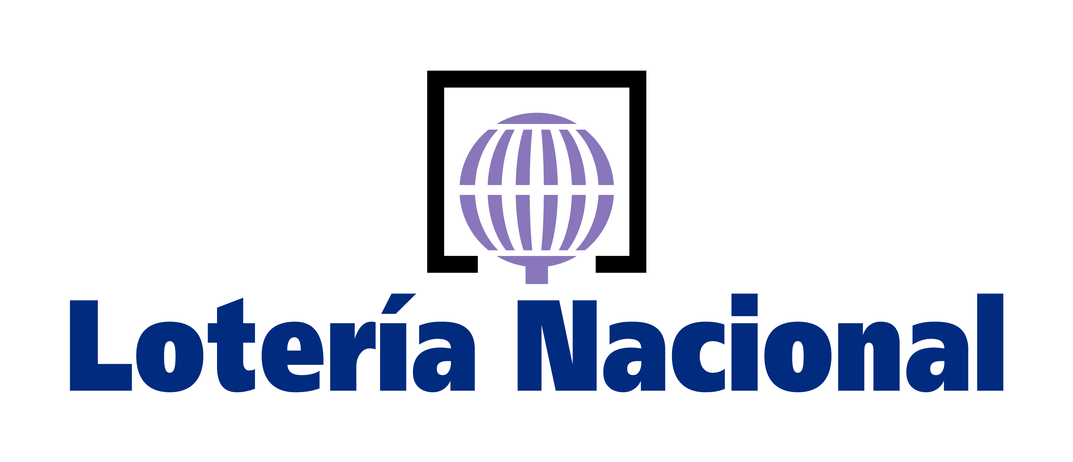 Logotipo de la Lotería Nacional de España. Representa el bombo metálico donde se colocan las bolas para la celebración del sorteo.